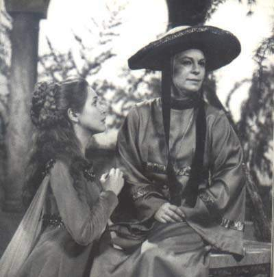 Evangelina Salazar y María Rosa Gallo, en una escena del "Romeo y Julieta" emitido por Canal 13 en 1966